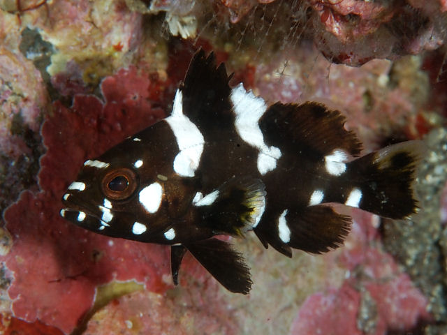 シロブチハタ Epinephelus maculatus